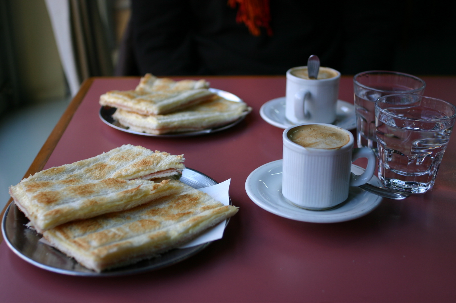 "Carlitos tostados mixtos" at Cafe Bar Varela Varelita on Scalabrini Ortiz Ave. (Buenos Aires)